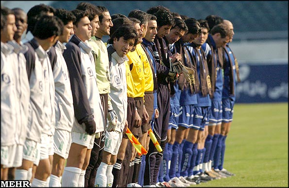 گزارش بازی